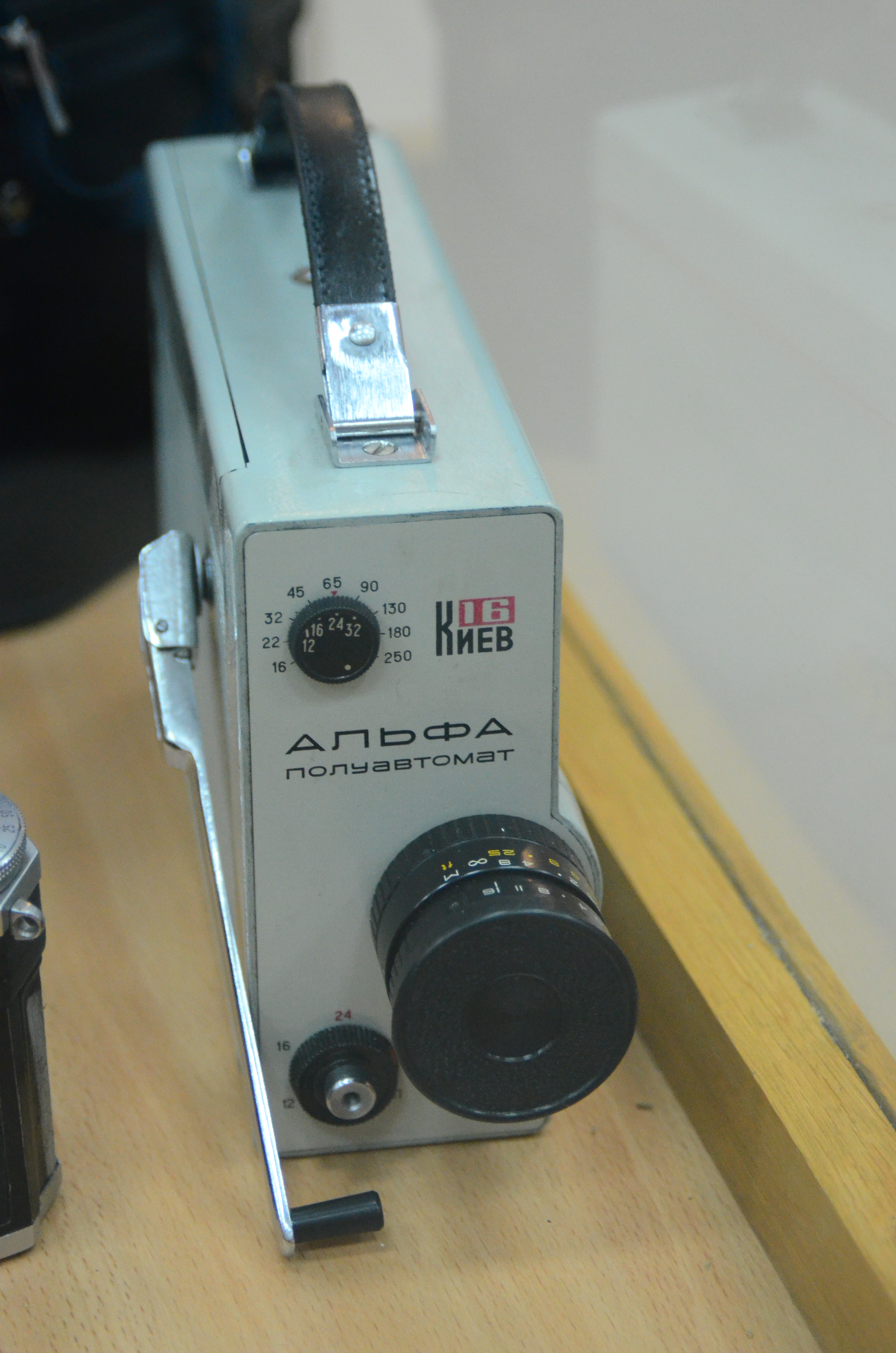 Музей историии и развития Донецкой железной дороги